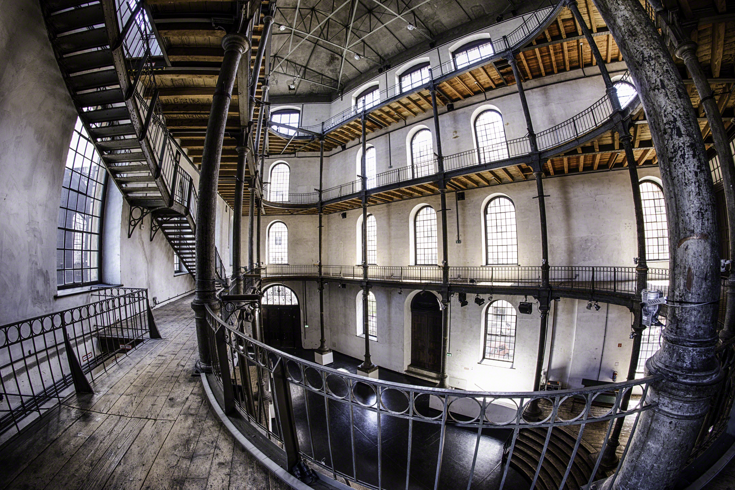 Semper-Depot - Innenaufnahme.